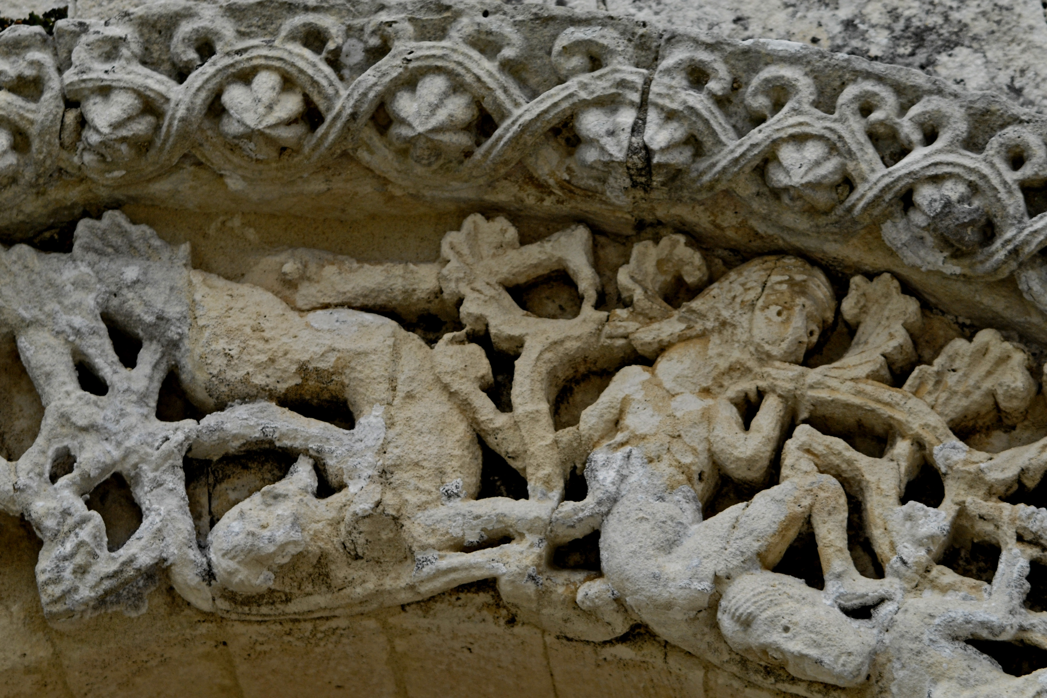 Notre-Dame Corme-Écluse,Linkes Scheinportal,äußerer Bogen